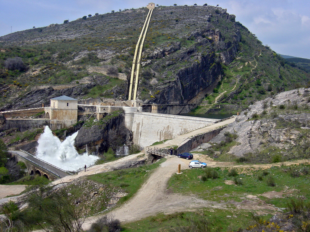 La vida del Pontón de la Oliva fue muy corta, ya que los ingenieros habían elegido mal el lugar donde erigir la presa y pronto aparecieron filtraciones que arruinaron la capacidad de embalse del pantano. Pocos años después de ser construida, la presa pionera de Madrid cayó en desuso y fue sustituida por la del embalse de El Villar.